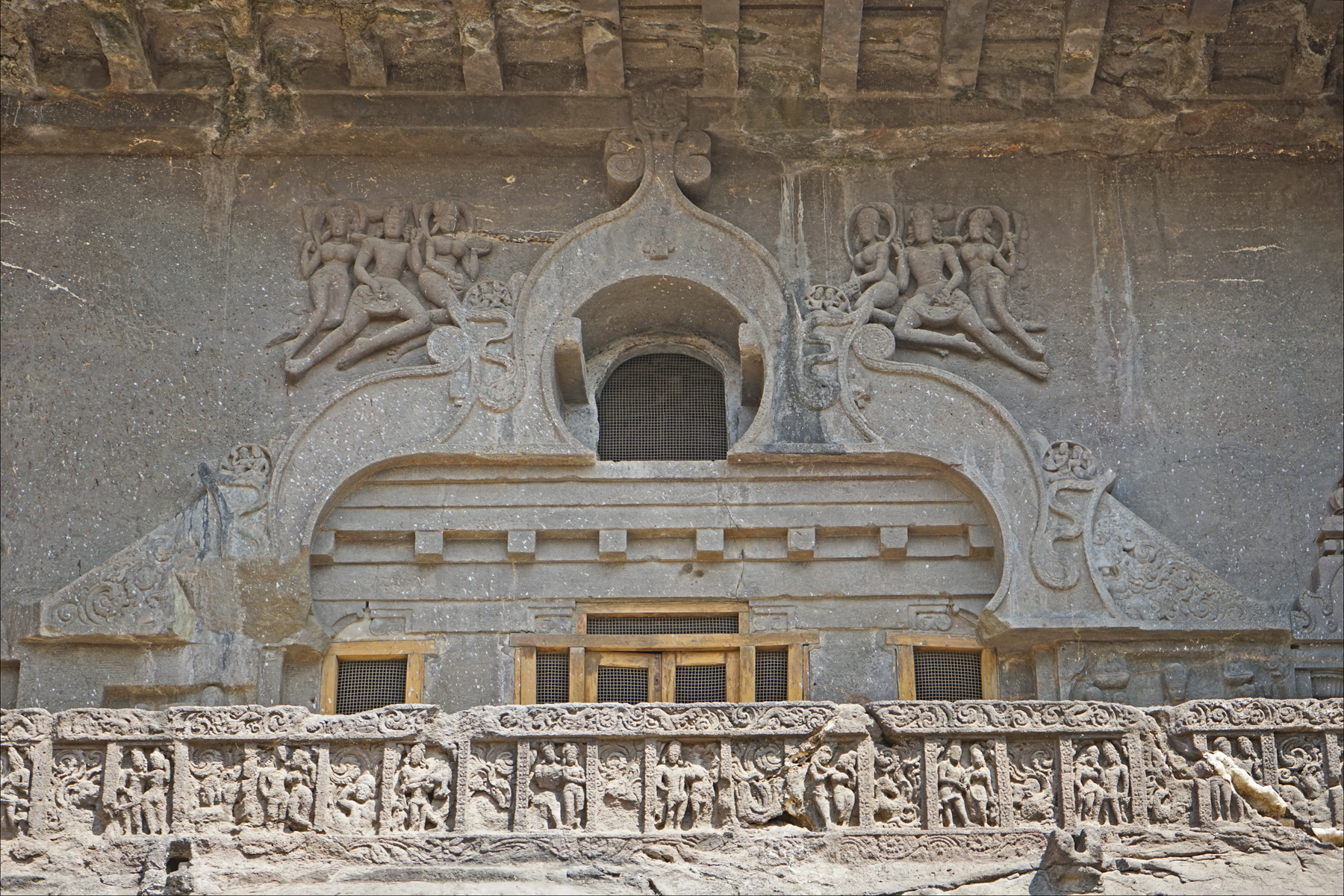 Détail de la façade sculptée (balcon et fenêtre) du Chatya Griha (grotte excavée n°10) à Ellora La façade est décorée avec des frises d'animaux et de couples enlacés. Les fenêtres qui éclairent l'intérieur sont remarquablement sculptées, des nymphes célestes la survolent. La grotte sculptée N°10 d'Ellora est appelée Vishwakarma, elle est dédiée au culte bouddhique et comprend sur deux niveaux : - un sanctuaire (Chaitya Griha) avec un stupa et une représentation du Bouddha en position d'enseignement, entouré de deux Bodhisattvas (Avalokiteshvara et Manjusri) - un monastère où habitaient les moines, situé à un niveau supérieur. L'aménagement de la grotte date du VIIè siècle. Les sculpteurs ont copié les formes des édifices archaïques en bois. La salle de prière possède trois nefs séparées par 30 colonnes et des sculptures raffinées sur les entablements. La vote en berceau à nervures ressemble à la coque d'un navire, d'ou le nom populaire du lieu : la grotte du charpentier.